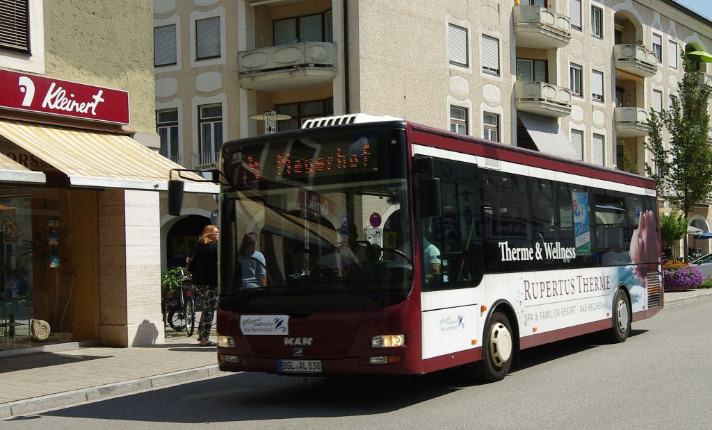 Stadtbus (City-Bus) der Stadtwerke Bad Reichenhall